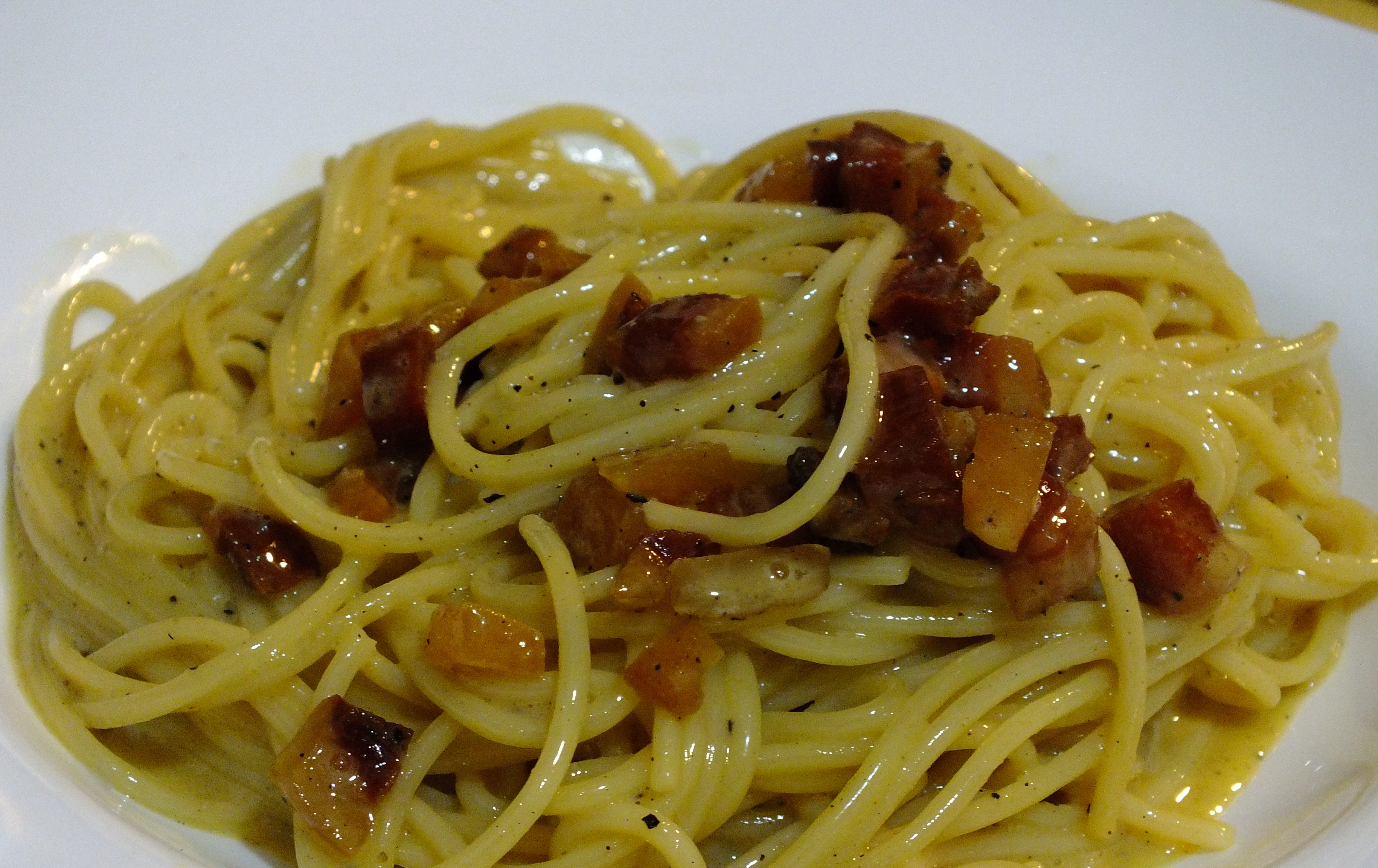 Como aparece la autentica Carbonara hecha con guanciale, huevos y pimienta negra.